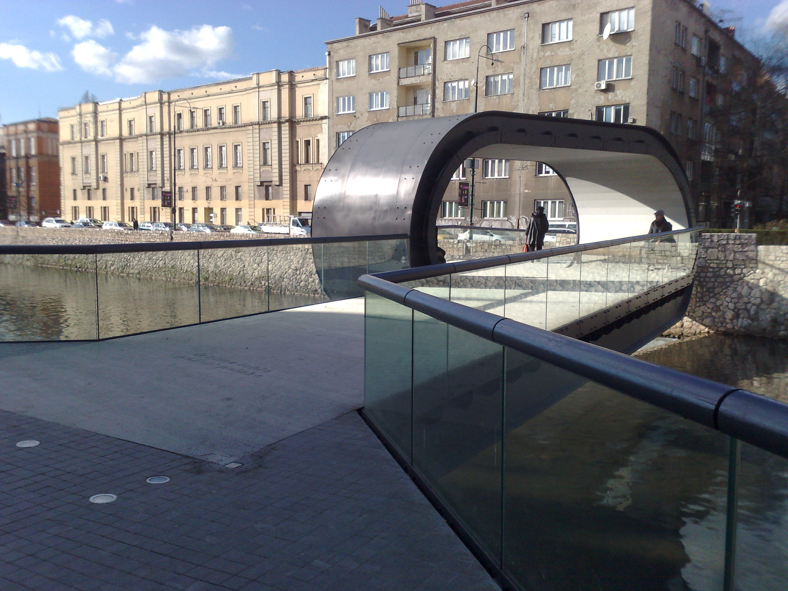 Ovo je slika mosta Festina lente u Sarajevu.